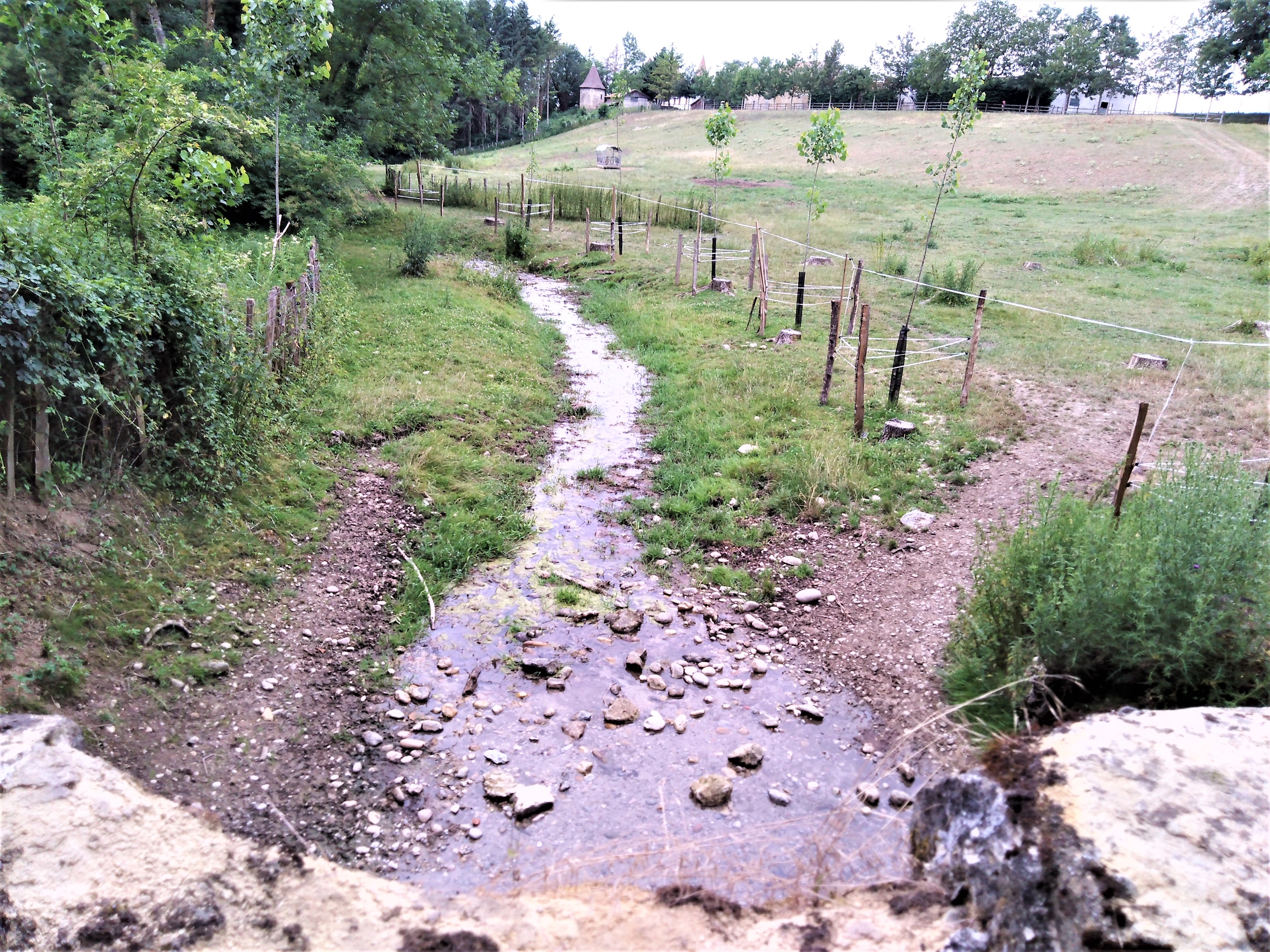 Ruisseau de Bouvante